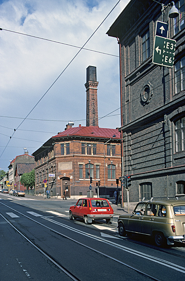 Badet vid korsningen av Karl Johansgatan och Djurgårdsgatan, invigt 1892. Bilden troligen från 1970-talet. Kategori: Badhus, Stadsmiljö